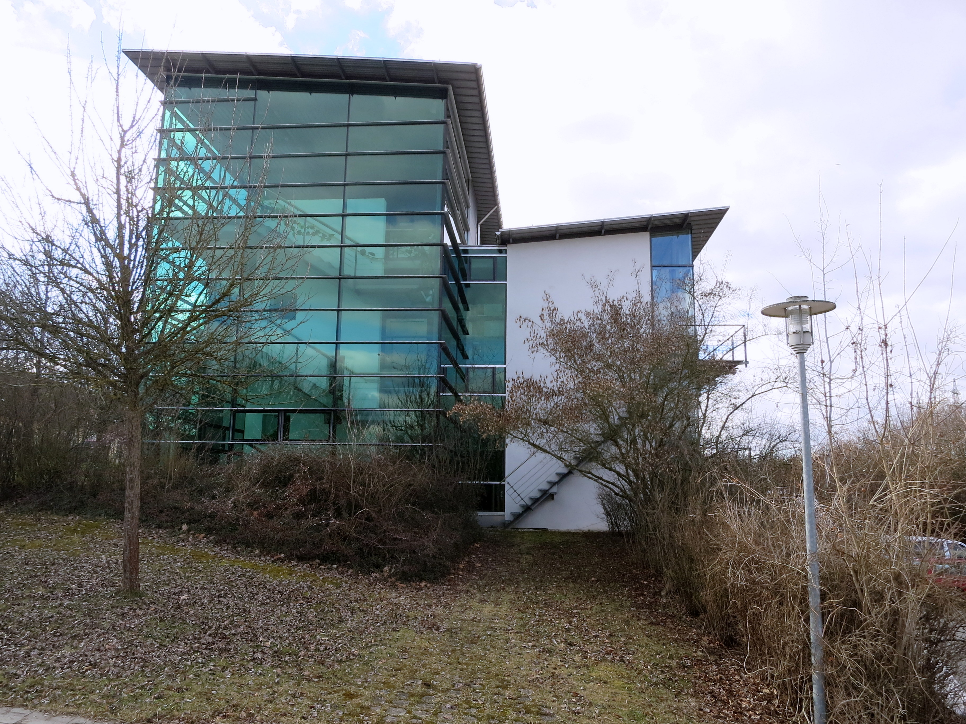 Institutsgebäude der Landesanstalt für Landwirtschaft (LfL)